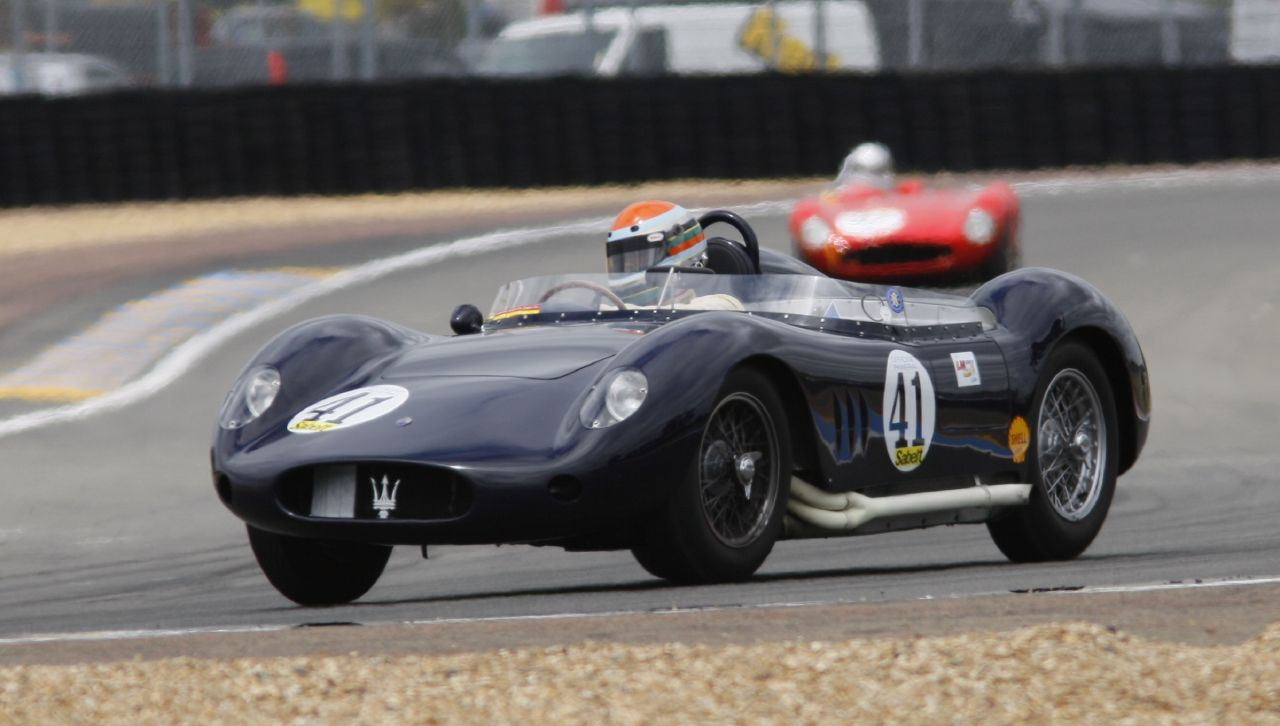 Maserati 250 SI de Marc DEVIS